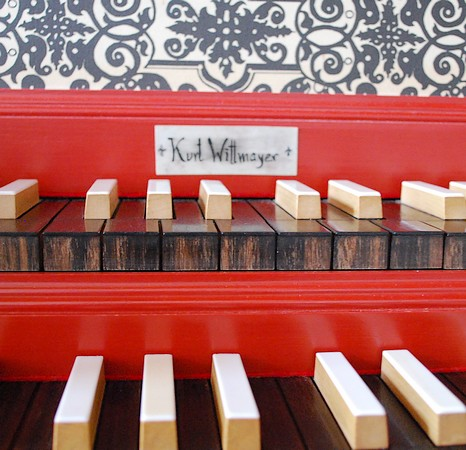 Vue de la signature "Wittmayer" de l'instrument vu en 2011 en l'église catholique de Wangen-an-der-Aare (Suisse, canton de Berne)